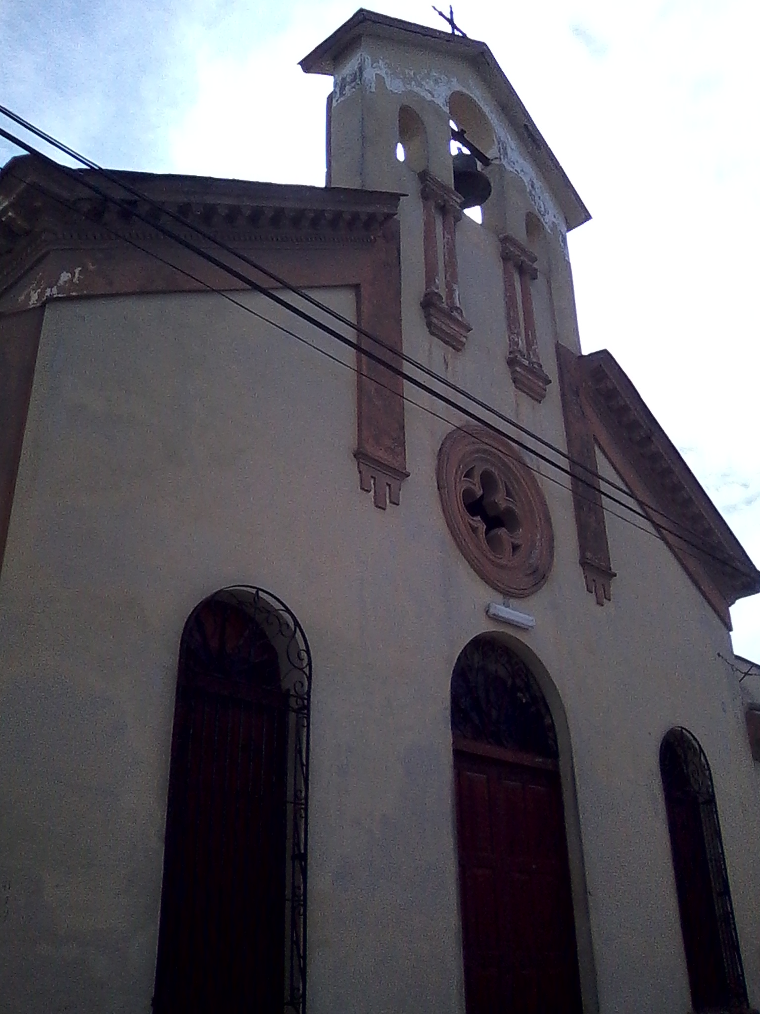 Iglesia de Niquero